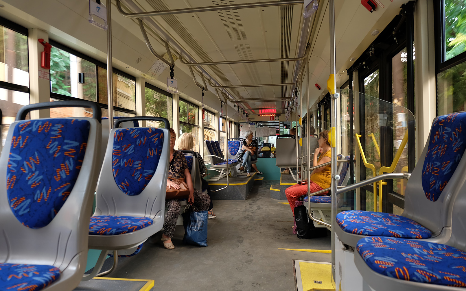 Трамвай 71-911E производства ПК "Транспортные Системы"? Ростов-на-Дону.